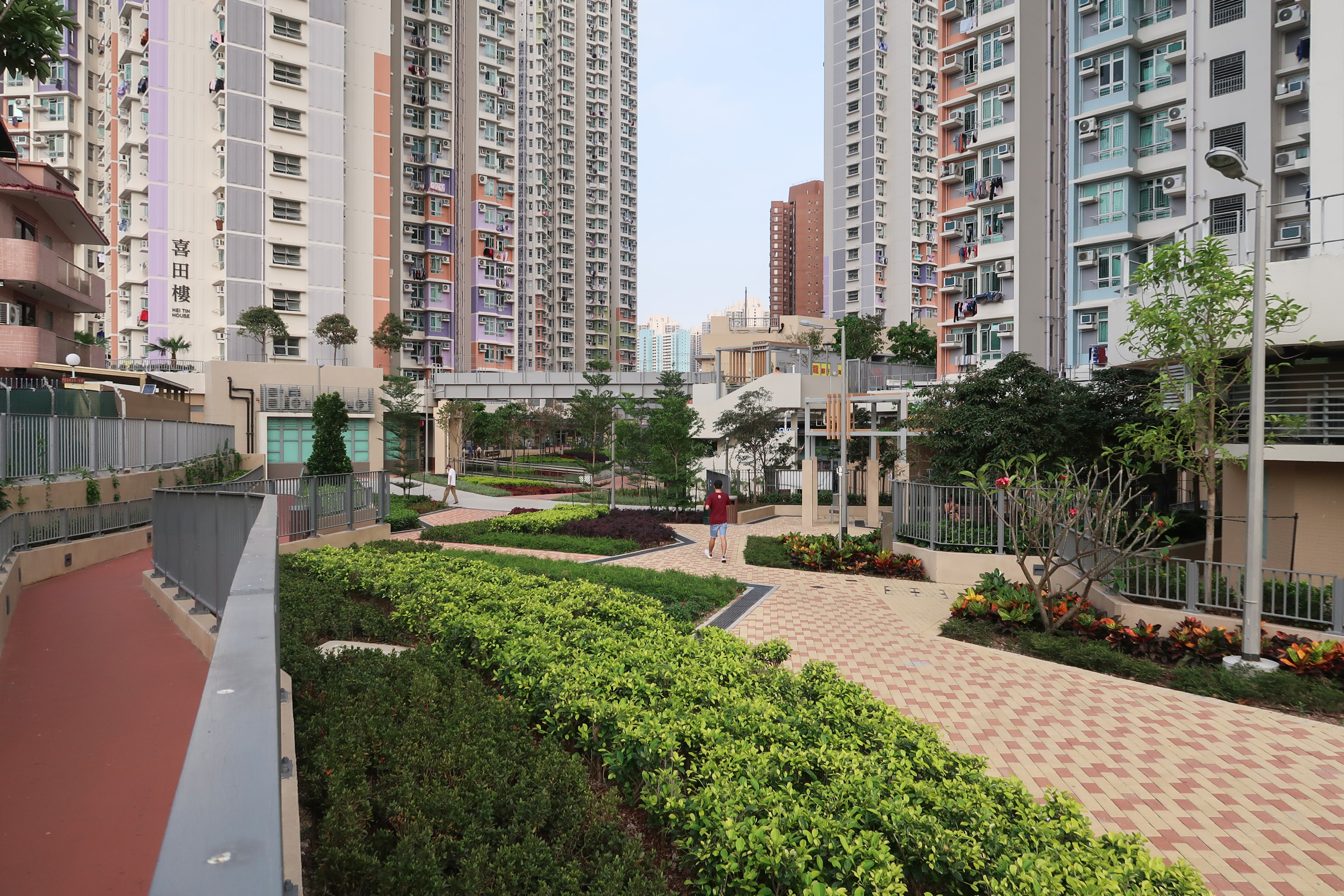 Yan Tin Estate Landscape Area